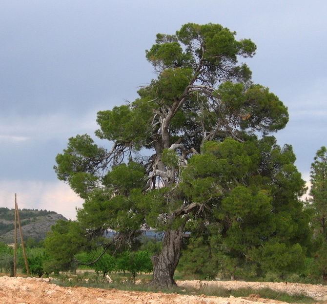 Pinus halepensis de más de 200 años y de más de 25 m de altura. Murcia. España.